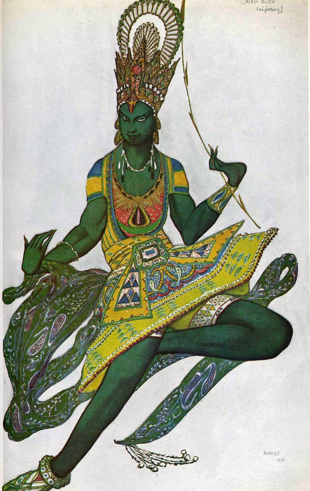 Costume design 1911